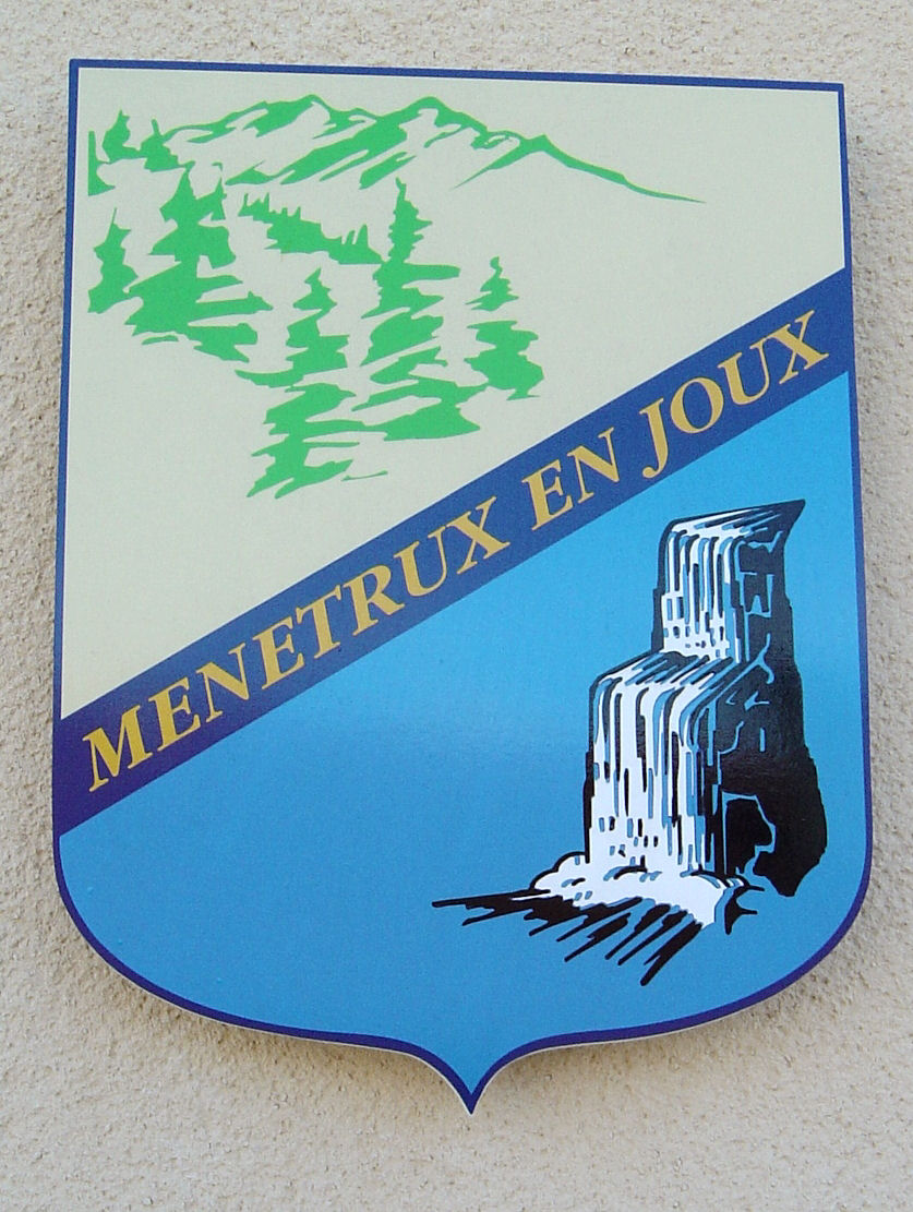 Logo de Menétrux-en-Joux (Jura)